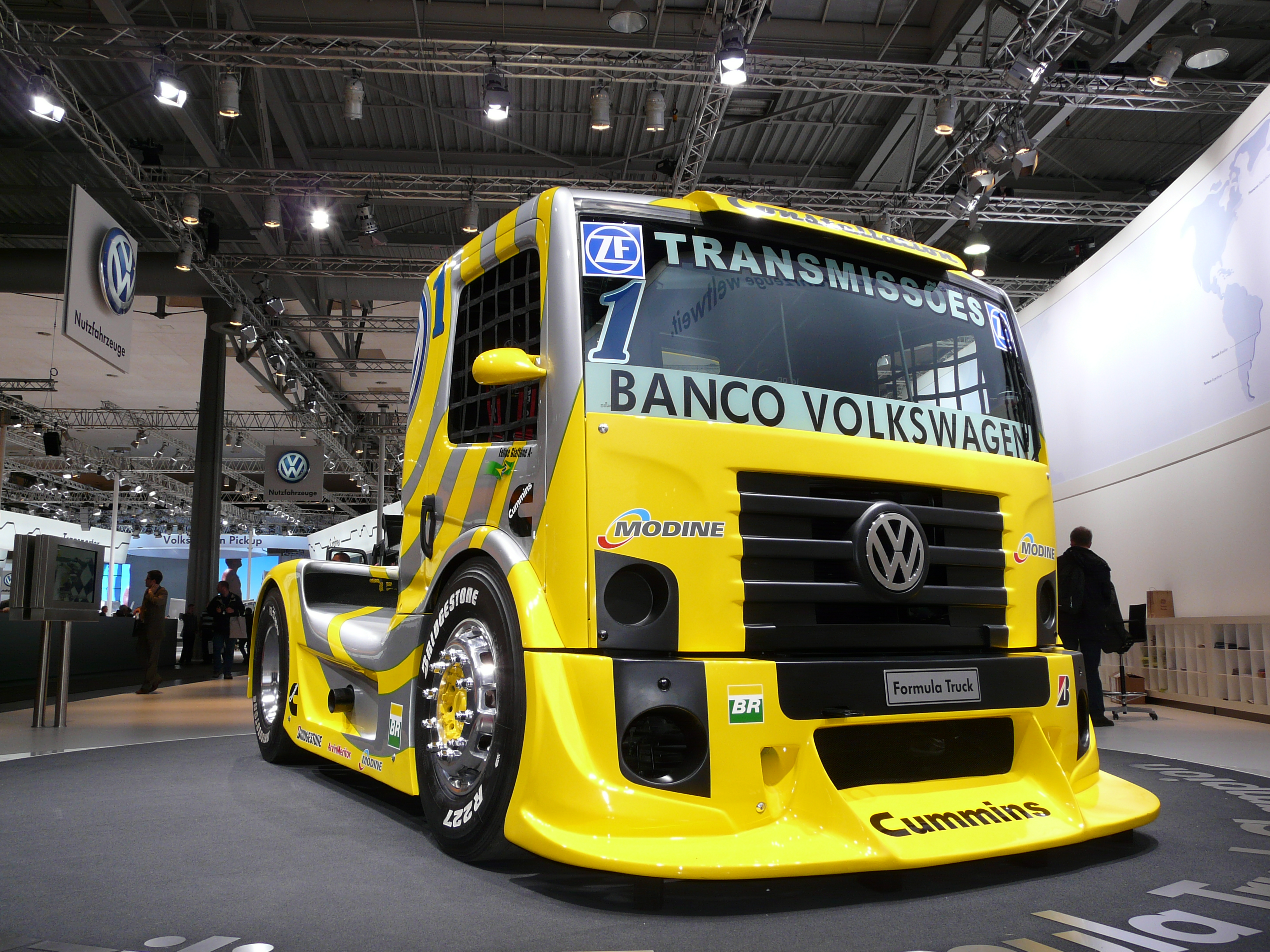 Volkswagen Race Truck auf Basis vom VW Constellation für das Brazilian Formula Truck Championship.